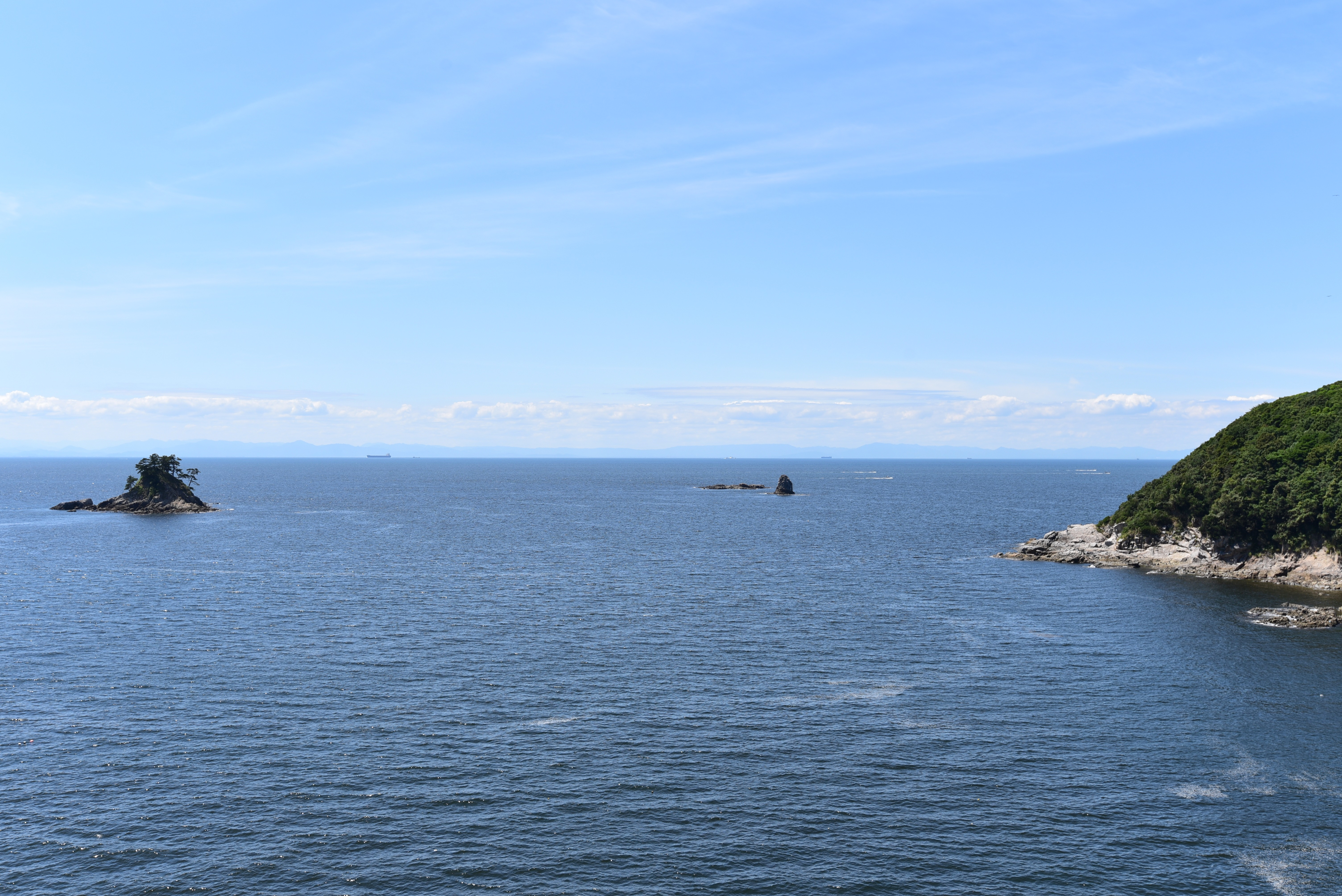 万葉の丘より松島方向を望む